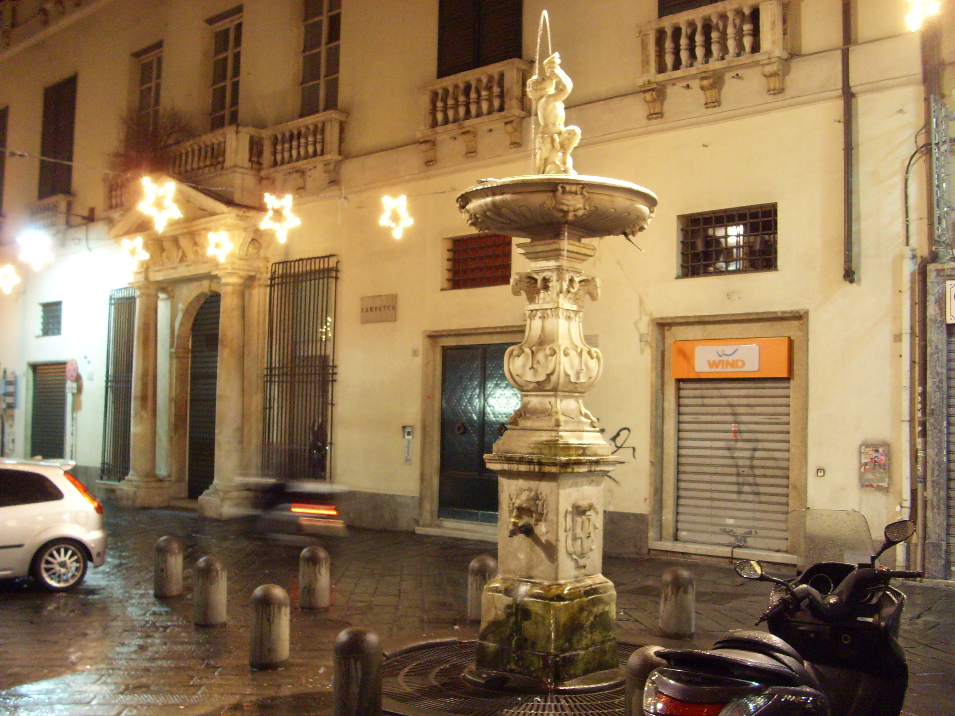 Piazza Campetto con il Barchile, una fontana ottagonale risalente al XVII secolo. Sullo sfondo Palazzo del Melograno, fatto costruire alla fine del XVI secolo